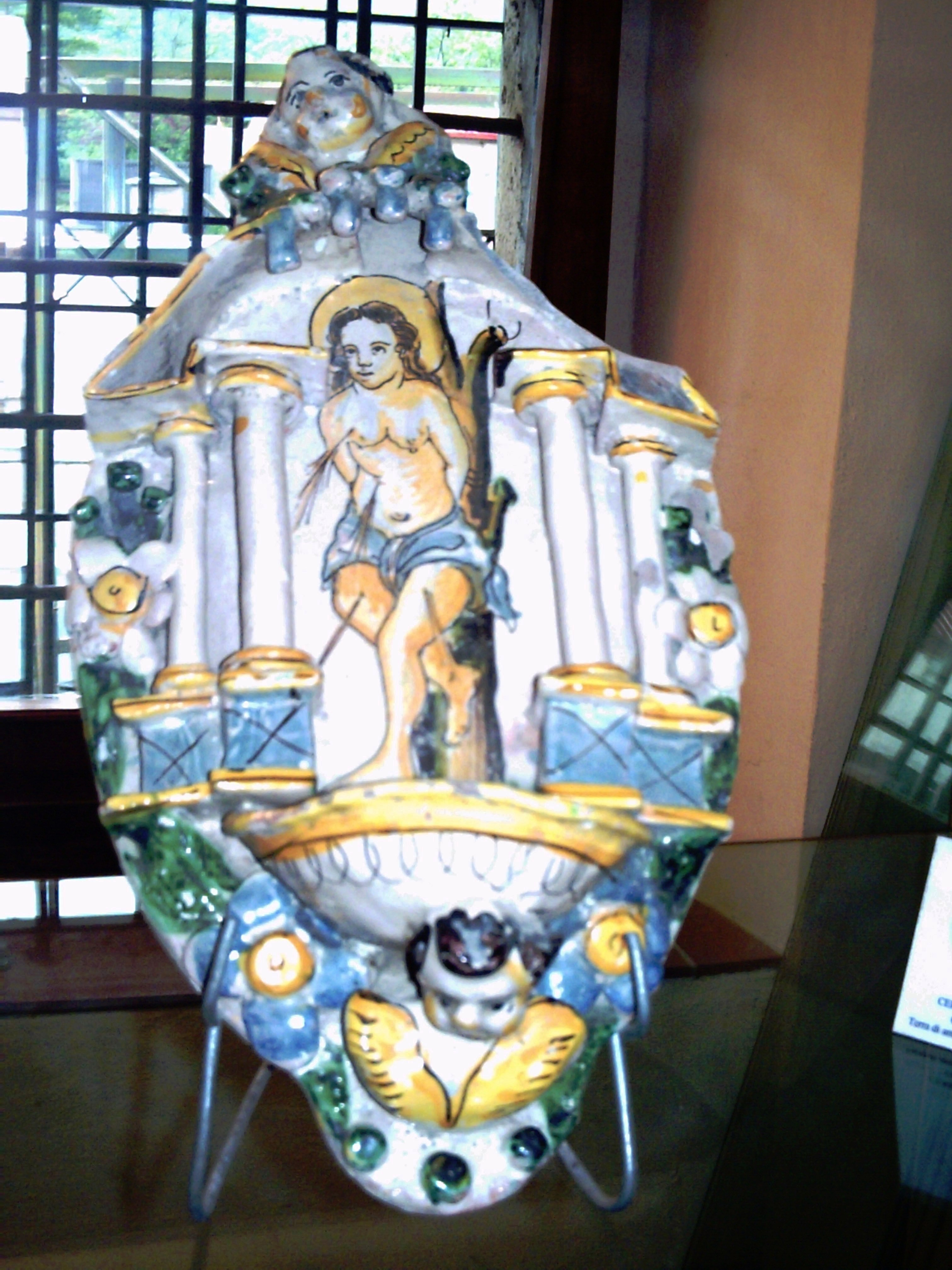 Acquasantiera in ceramica di Cerreto Sannita (XVII secolo).